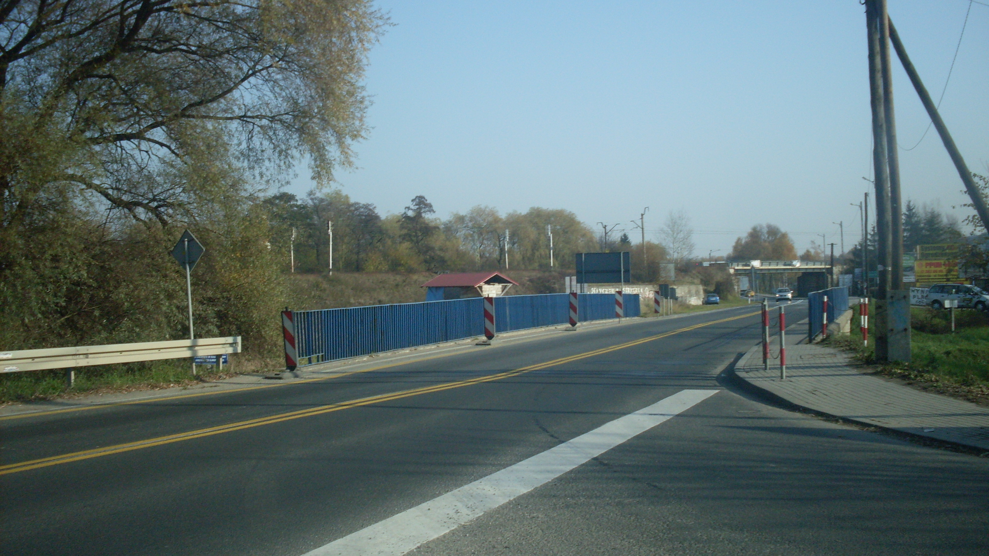 Zabierzów. Most nad rz. Rudawa (DK 78)